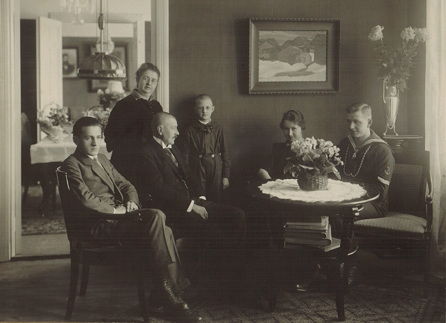 Perhe Gönberb 1921